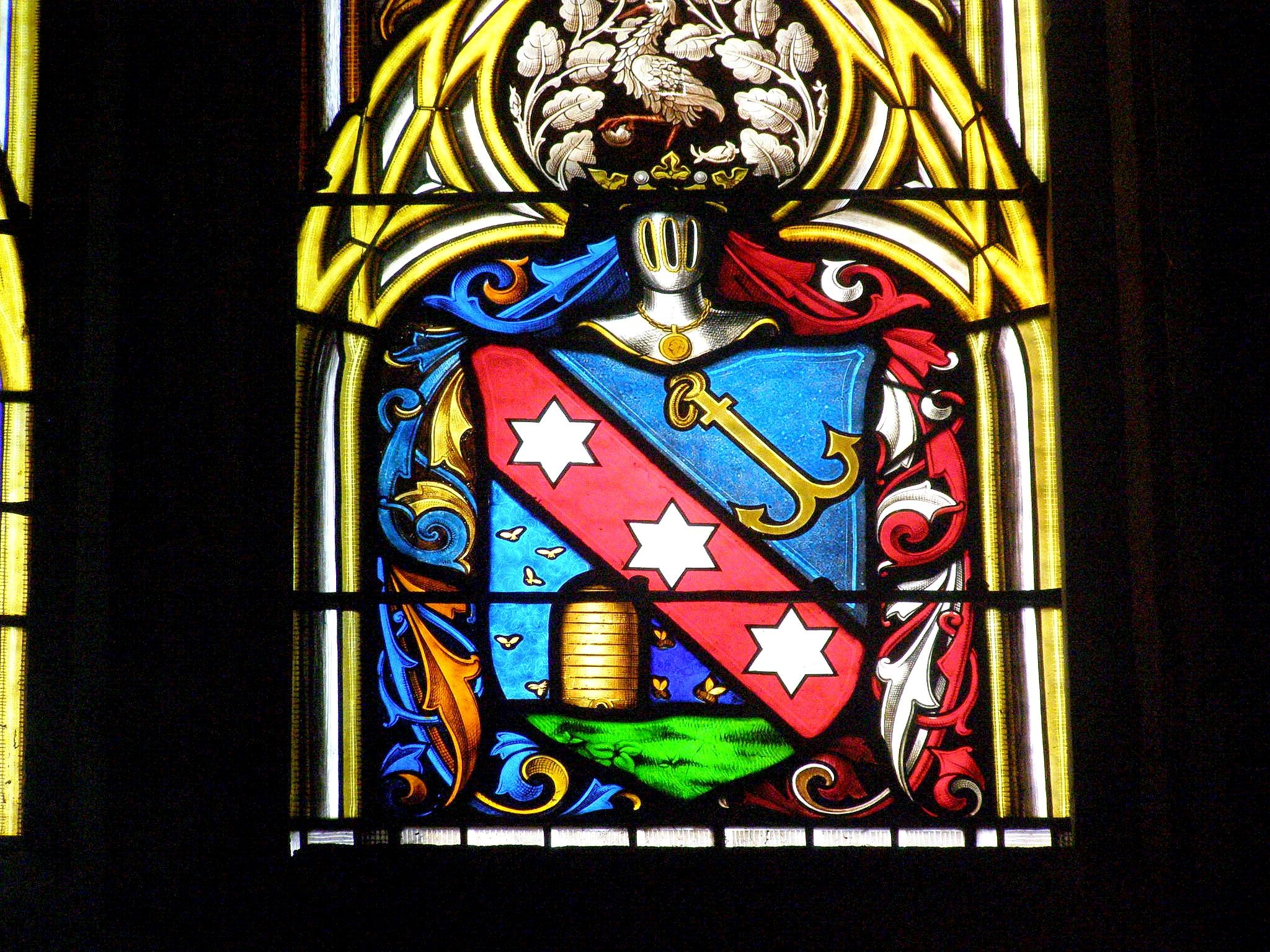 Druhá spodná tabuľka zľava okna Scherzovcov obsahuje rodový erb. Na modrom poli je červené kosmé brvno s tromi bielymi šesťcípimi hviezdami. V hornej časti štítu je zlatá kotva, v spodnej na zelenej pažiti zlatý úľ s deviatimi letiacimi včelami. Klenot tvorí biely stojaci žeriav držiaci v pravej končatine kameň